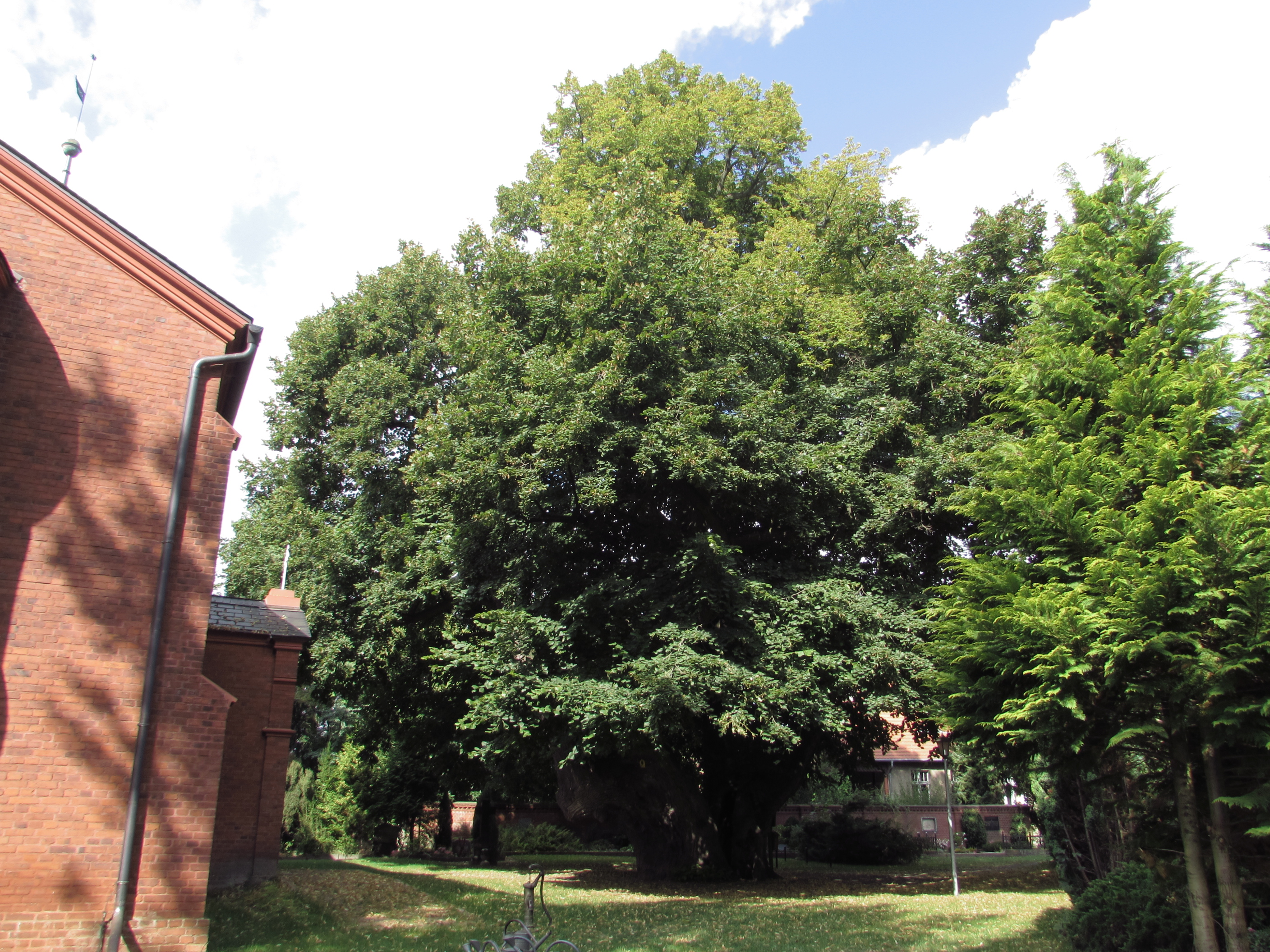 schwedenlinde